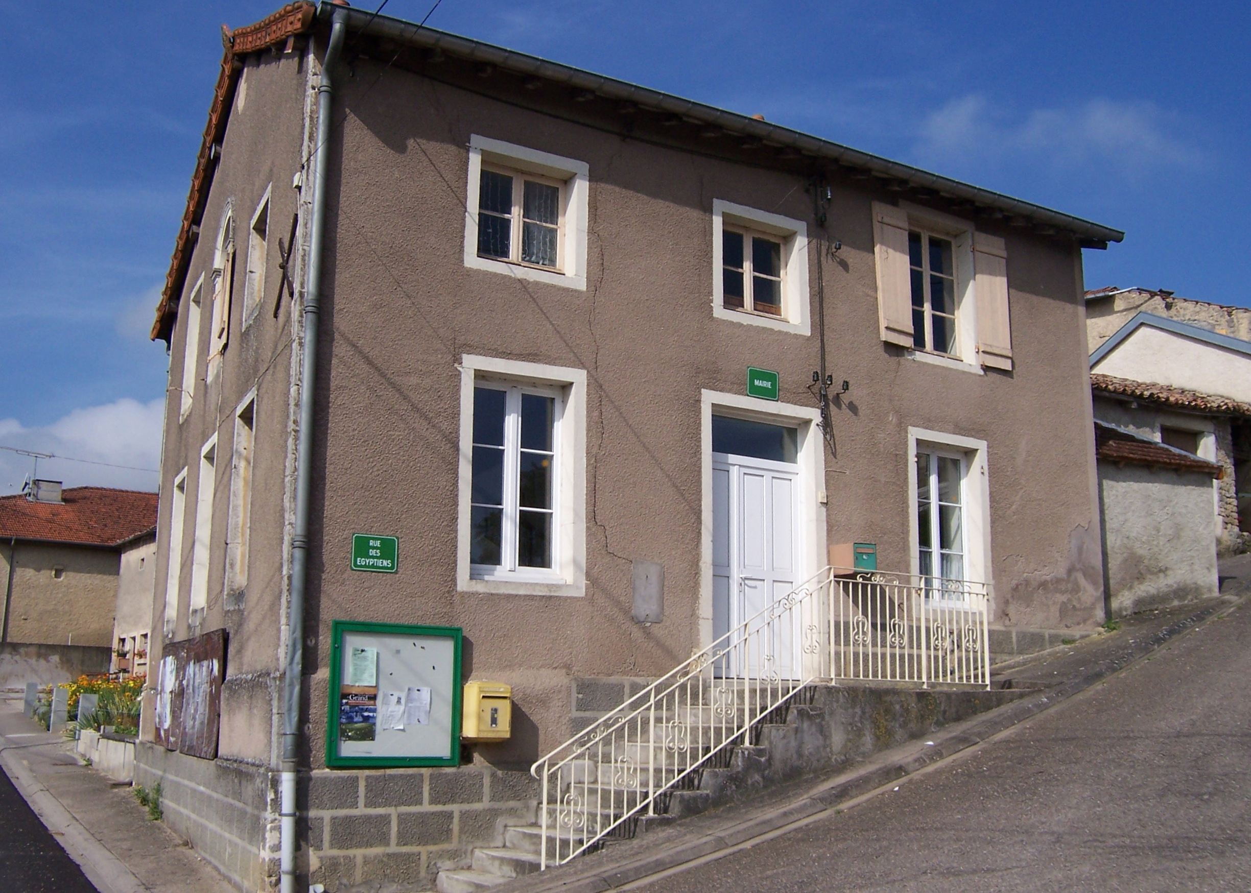 Description mairie de clérey-la-côte DateSeptember 2007Sourceclerey.neuf.frAuthorflorian godard mairie de clérey-la-côte